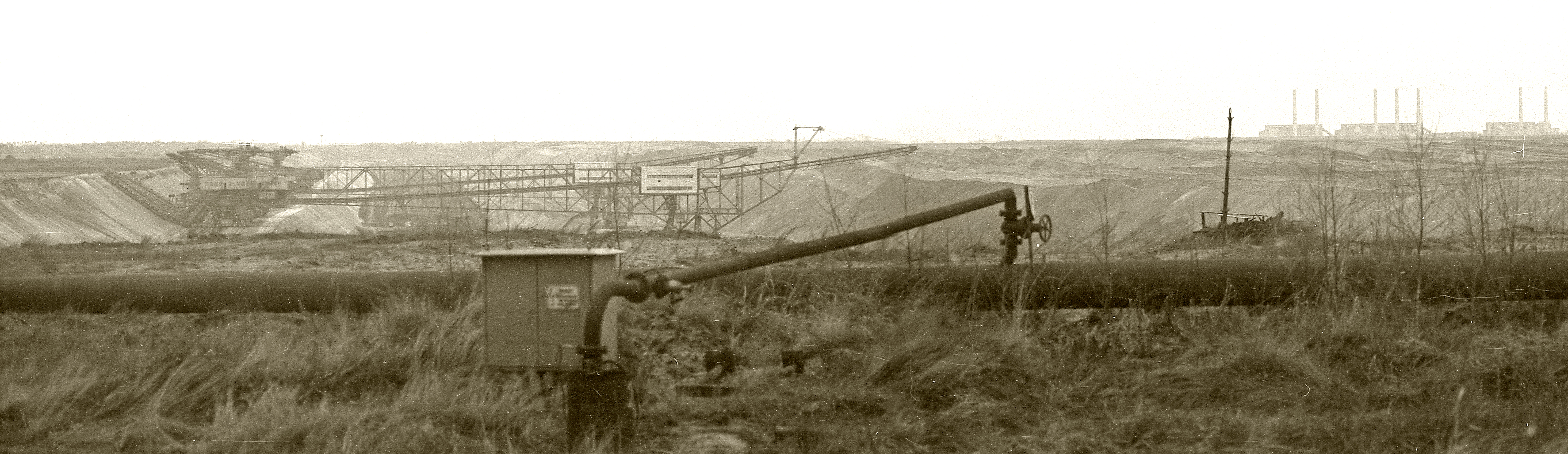 Förderbrückenverband (Förderbrücken und Eimerkettenbagger) im Tagebau Seese-West und im Hintergrund rechts das Kraftwerk Lübbenau, 1976.